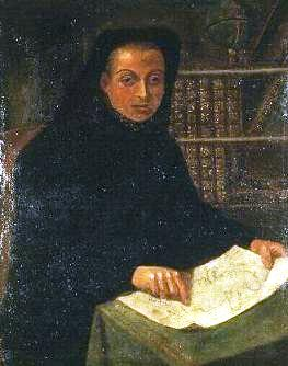 Depicted person: Louis Feuillée